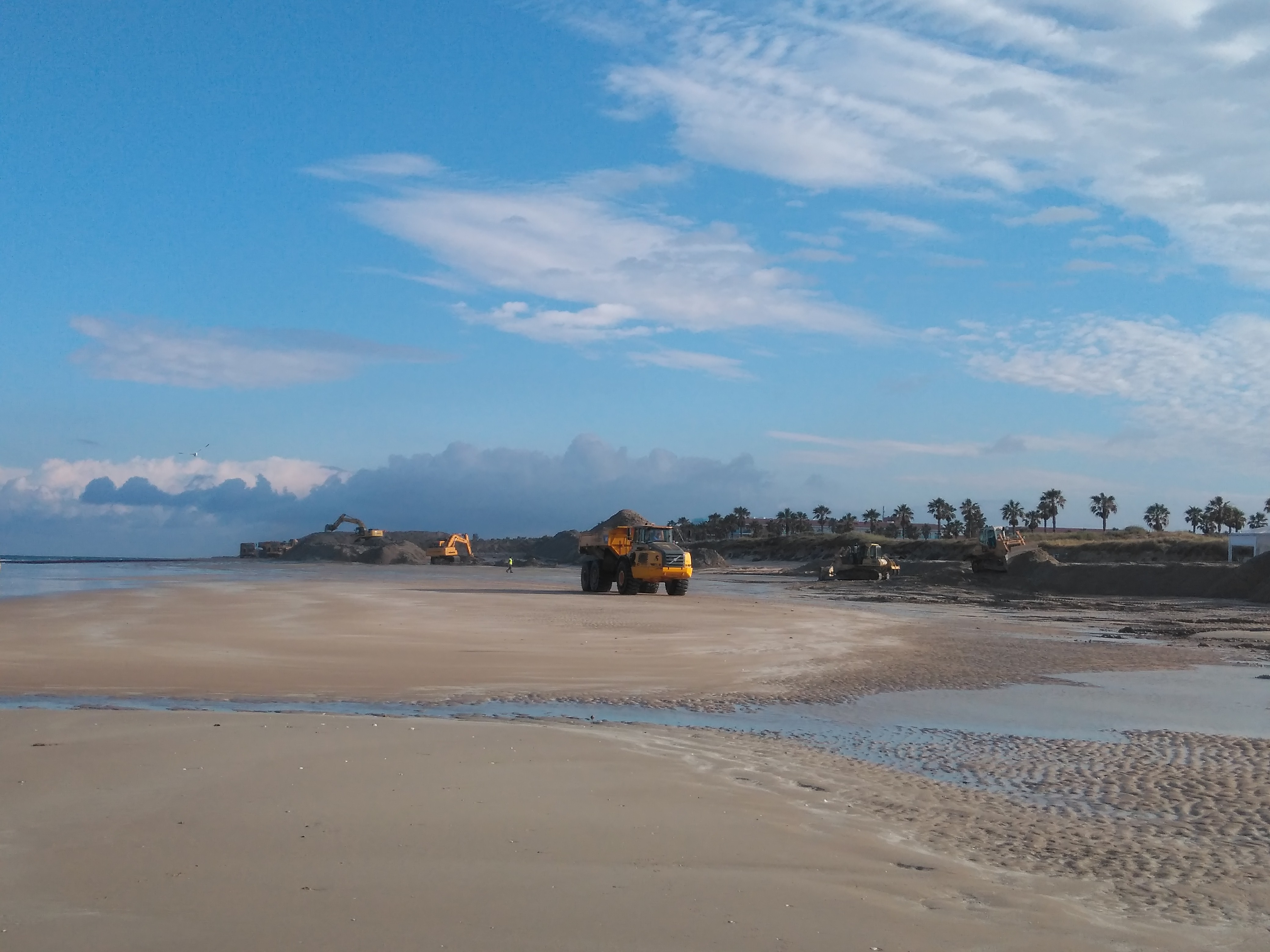 Obras de reposición de arena en la playa de Las Tres Piedras (Chipiona, Cádiz)